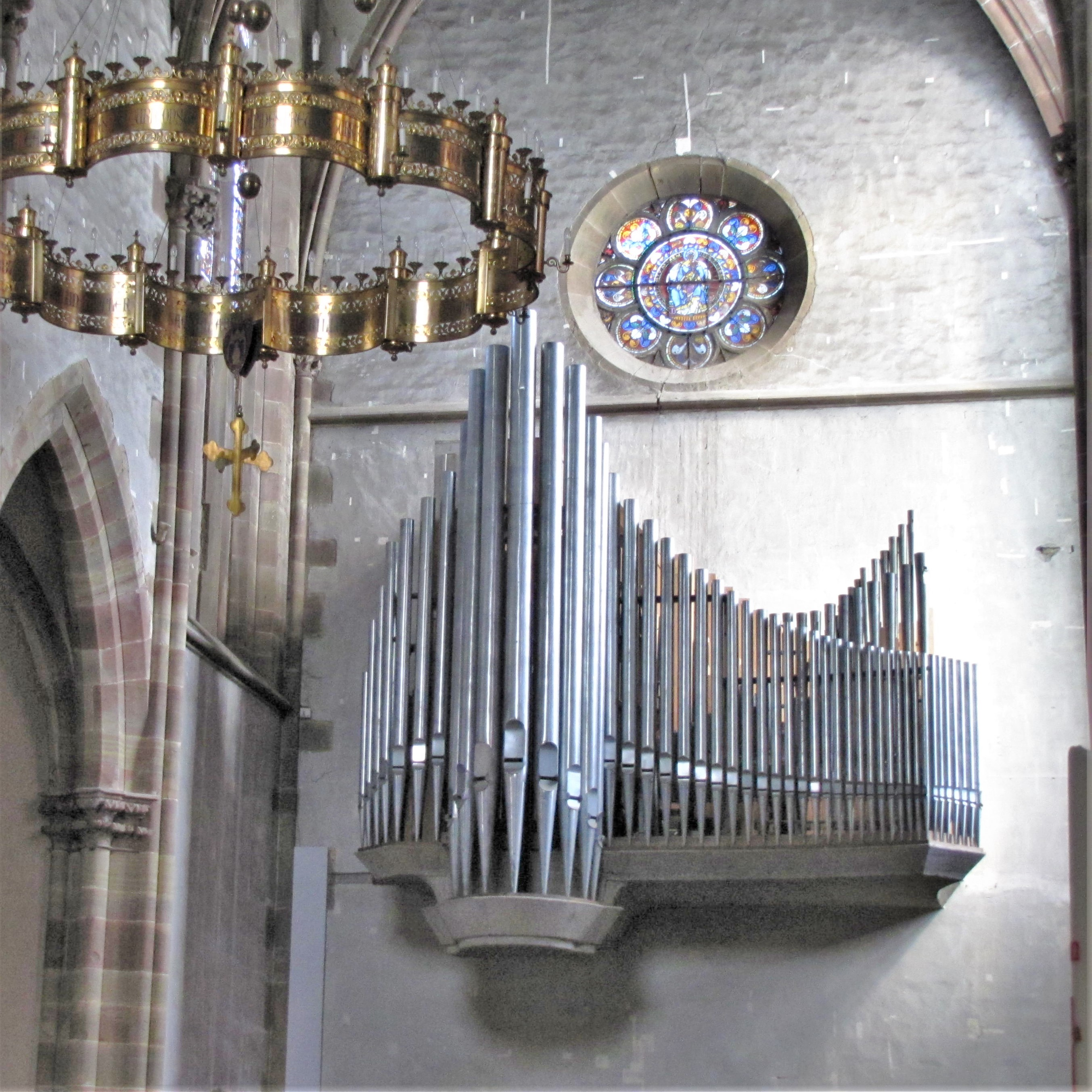 Alsace, Bas-Rhin, Wissembourg, Église abbatiale Saints-Pierre-et-Paul (PA00085247, IA67008036). Lustre (1887): Orgues du transept Roethinger (1953): transept Sts-Pierre-et-Paul, Wissembourg